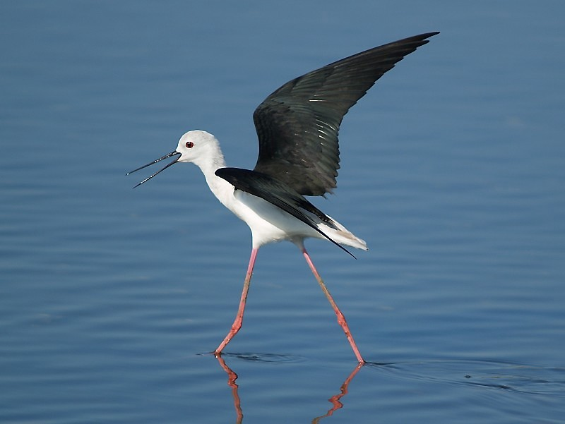 Himantopus himantopus（高蹺鴴．黑翅長腳鷸）, Taiwan, 2007.